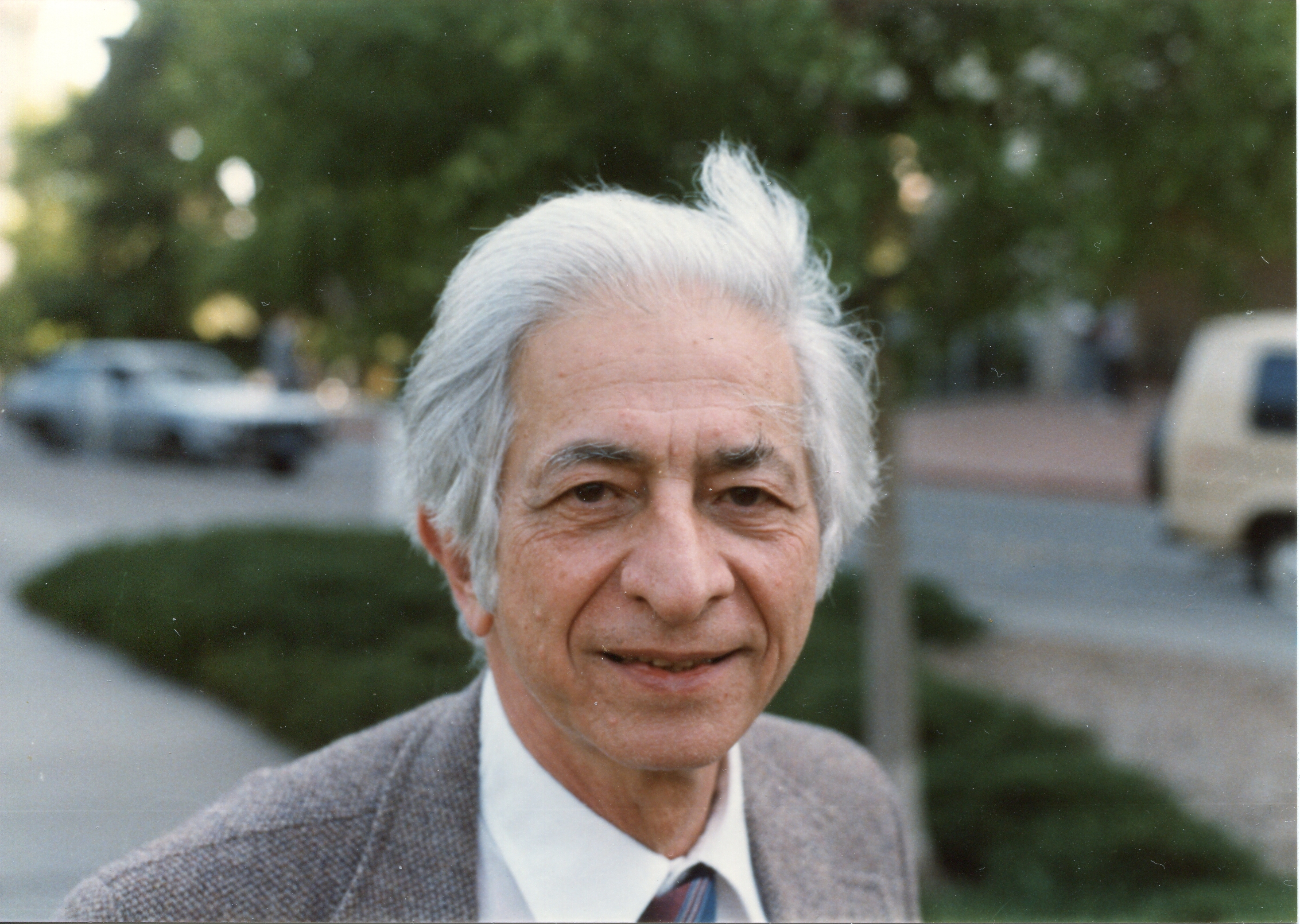 Foto di Abraham Seidenberg